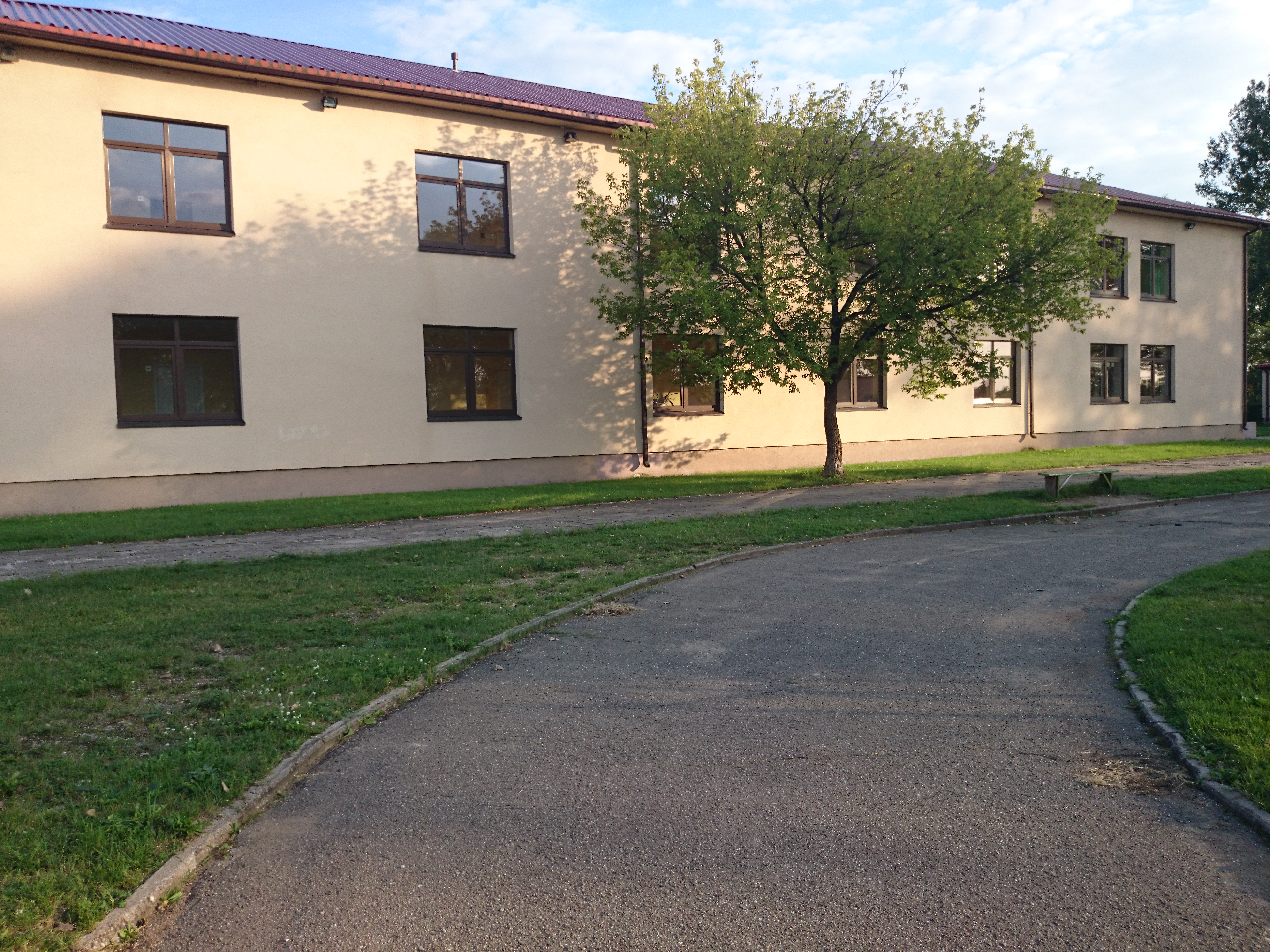 Lietavos pagrindinė mokykla